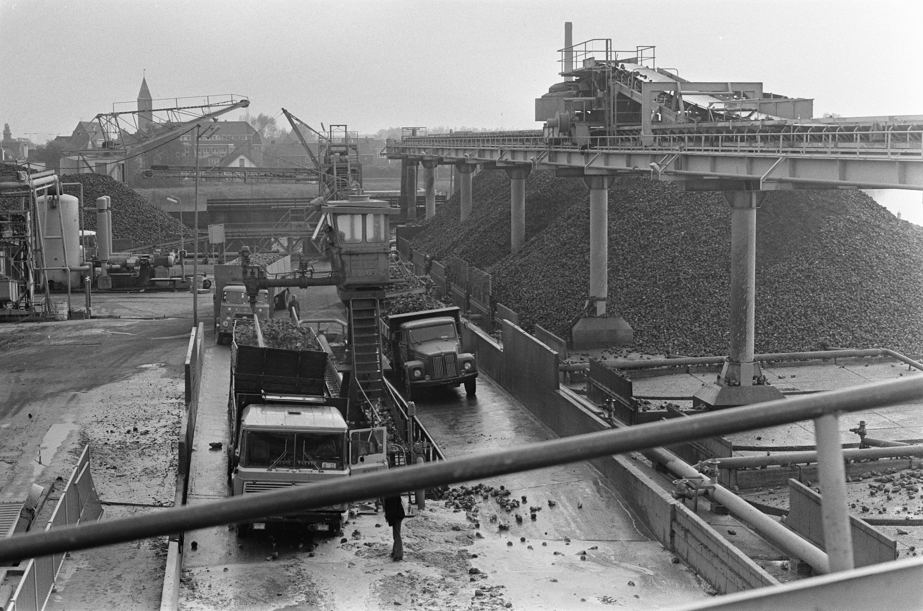 Collectie / Archief : Fotocollectie Anefo Reportage / Serie : [ onbekend ] Beschrijving : Suikerbietencampagne in volle gang bij CSM in Halfweg; een overzicht tijdens de verwerking van de bieten bij de CSM Datum : 15 oktober 1974 Locatie : Halfweg Trefwoorden : Suikerbieten, campagnes, overzichten Persoonsnaam : CSM Fotograaf : Peters, Hans / Anefo Auteursrechthebbende : Nationaal Archief Materiaalsoort : Negatief (zwart/wit) Nummer archiefinventaris : bekijk toegang 2.24.01.05 Bestanddeelnummer : 927-5142